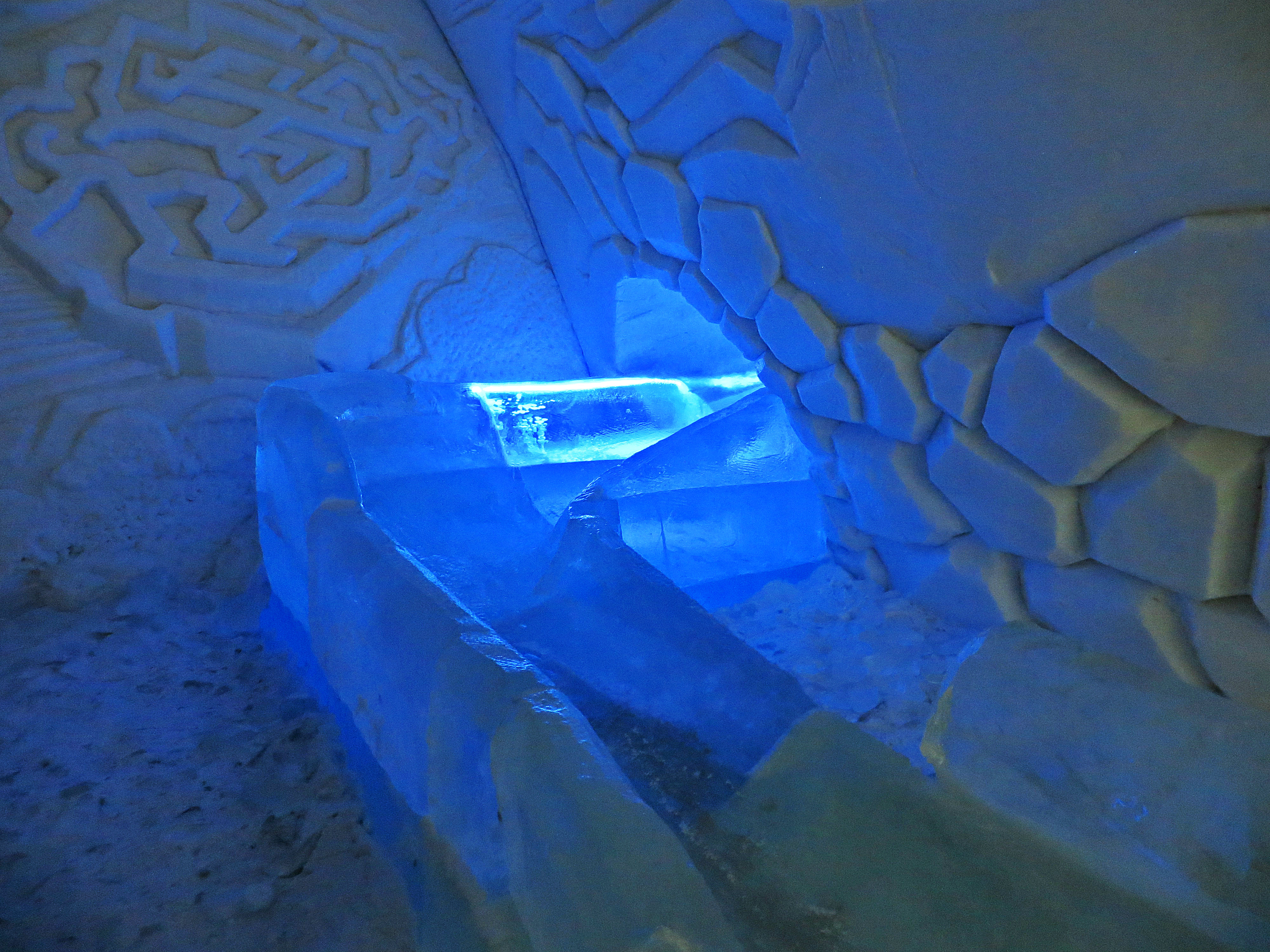 LumiLinna Snow Castle Kemi